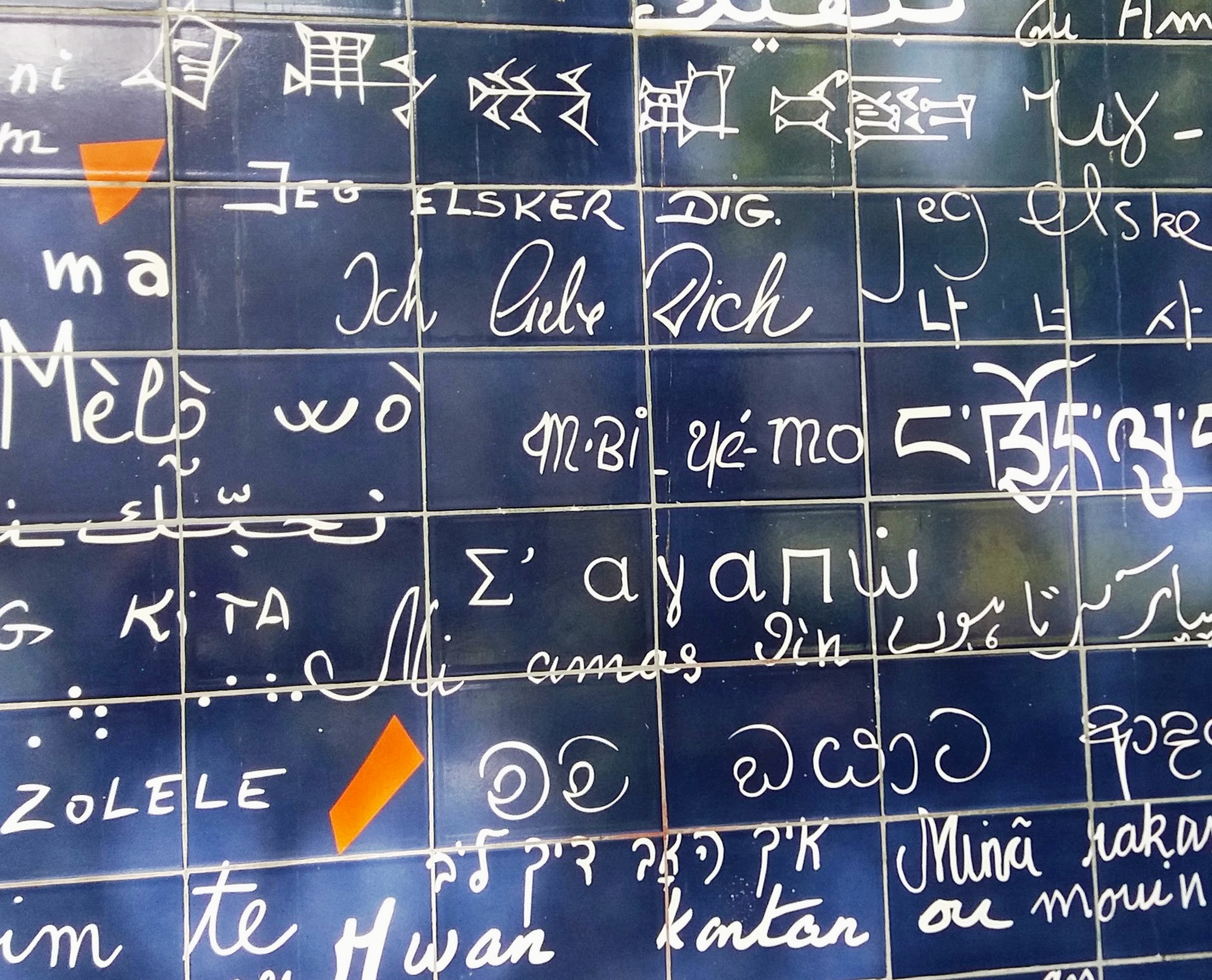 Le mur des je t'aime Paris Montmarte; Ausschnitt.